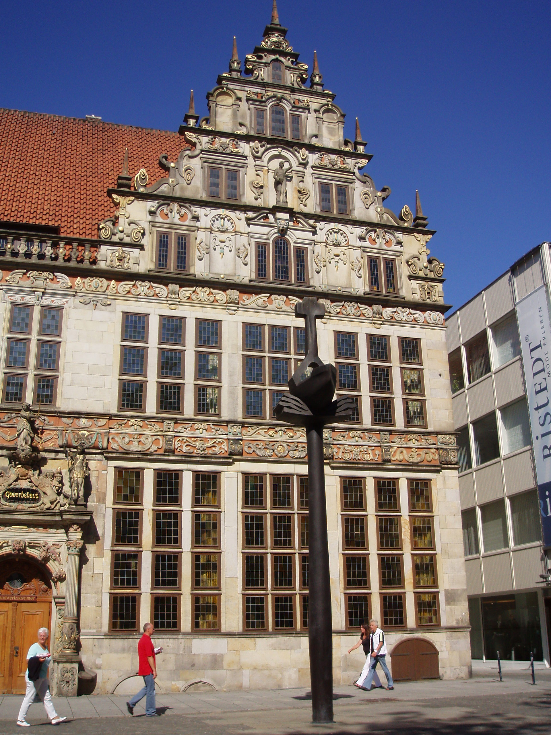 Gewerbehaus Bremen, rechter Giebel